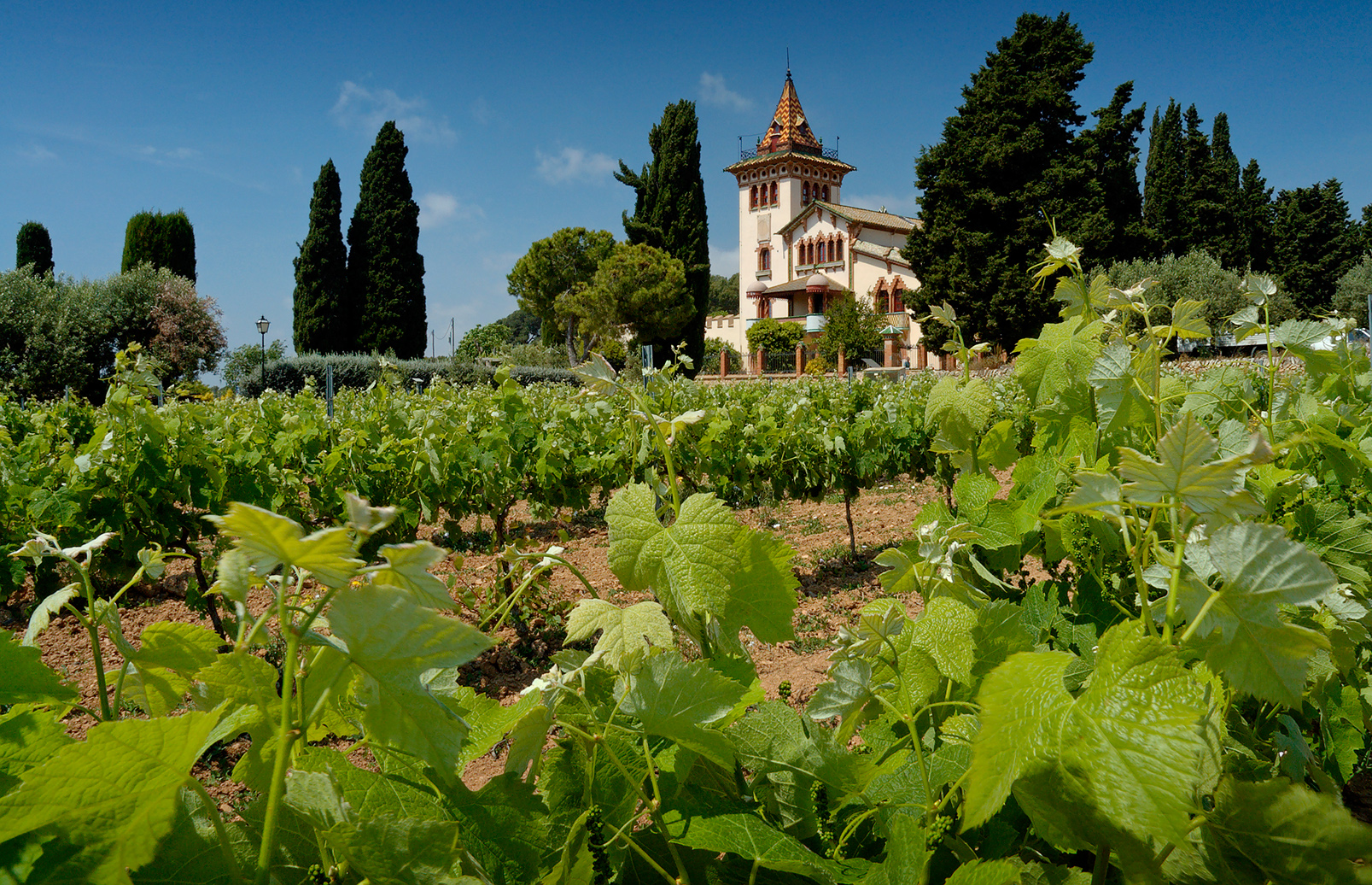 Tempranillo vines, Clos la Plana vinyard, Penedes region, Spain 2006